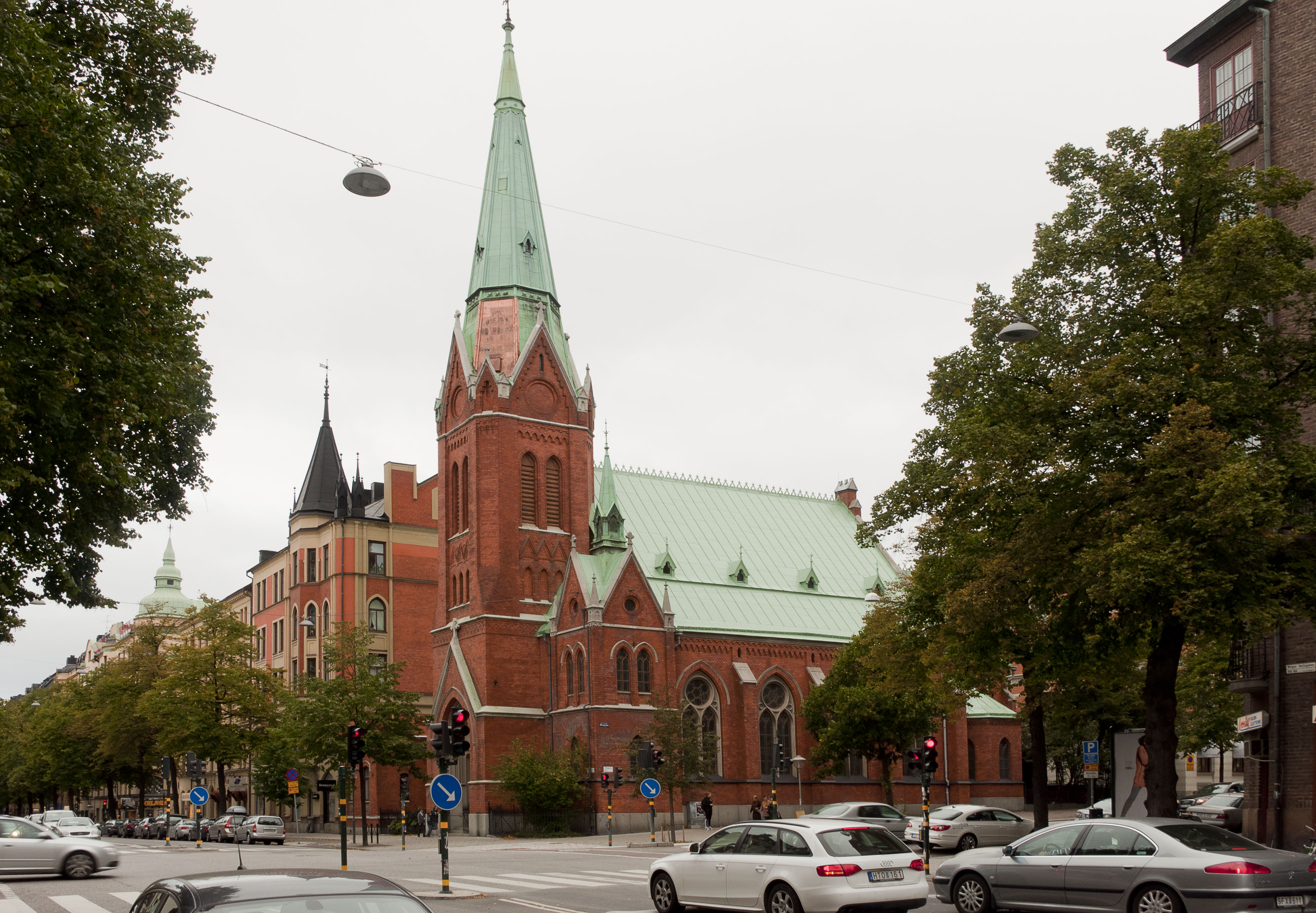 Birger Jarlsgatan 92. S:t Georgios Grekisk-Ortodoxa Metropolitkyrka